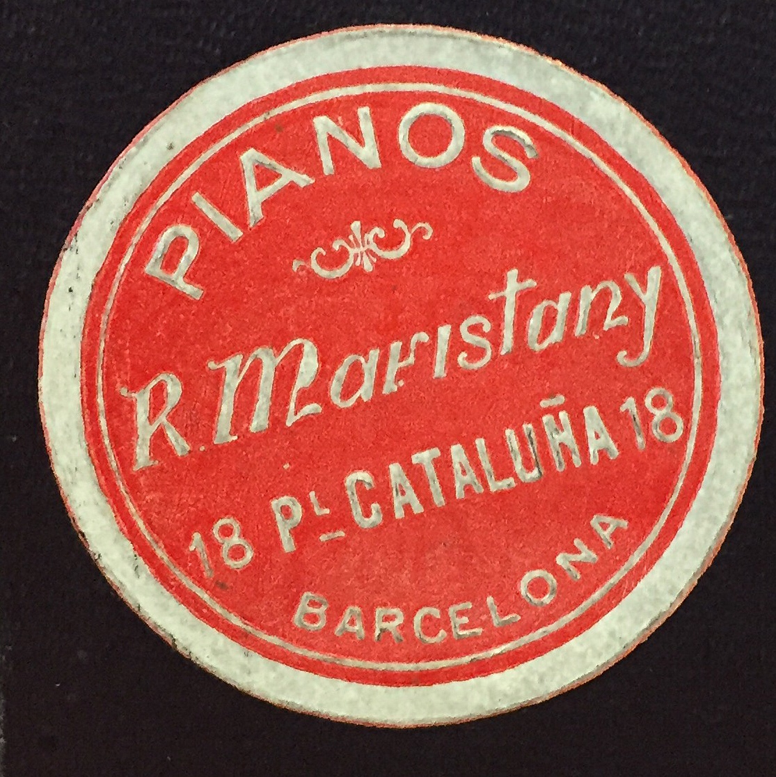 Detall de l'etiqueta de l'empresa de pianos R. Maristany, Plaça Catalunya, 18, Barcelona, enganxat a un rotlle de pianola Victoria